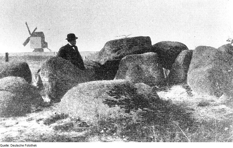 Original image description from the Deutsche Fotothek Steinfeld (Altmark). Bockmühle, im Vordergrund das Hünengrab, aus: 51. Jahresbericht des Altmärkischen Vereins für vaterländische Geschichte, 1937